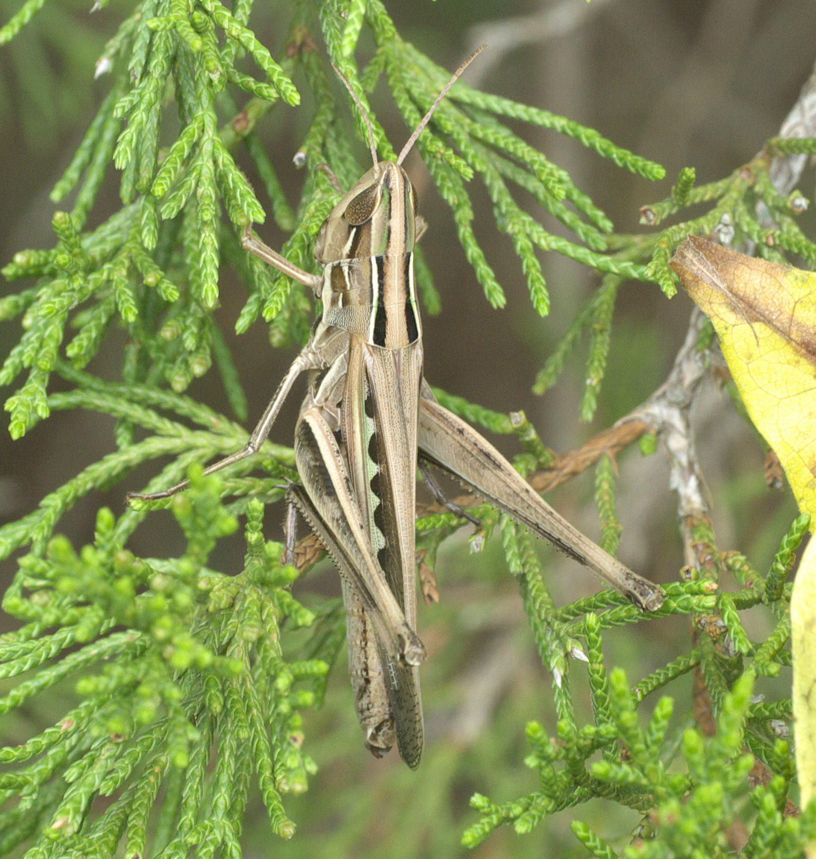 Syrbula admirabilis, Admirable Grasshopper, ID Confidence: 87